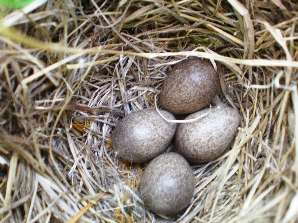 Dirvinio vieversio lizdas Foto: Hugo.arg 2007.05.23